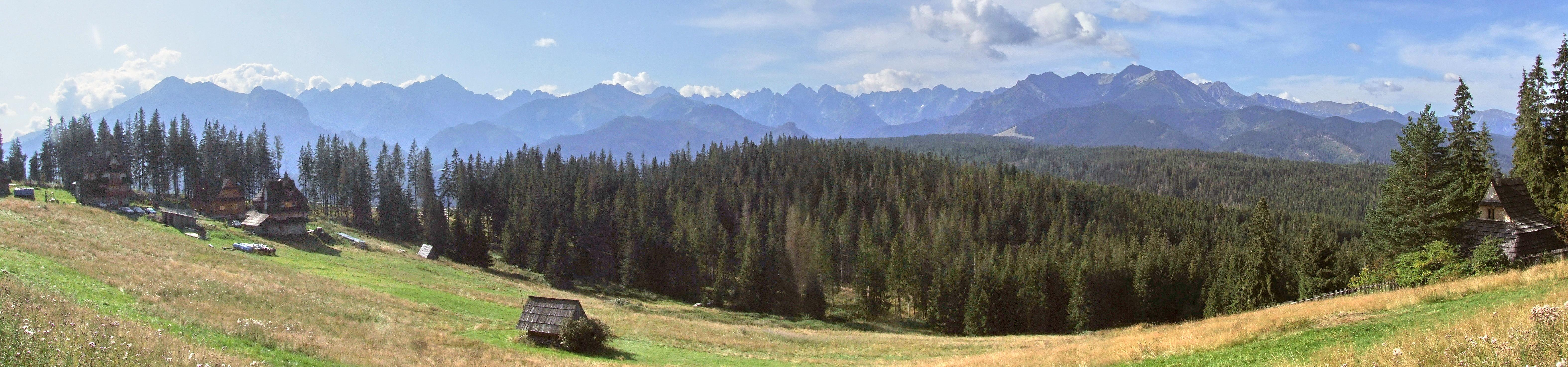 Panorama Tatr Z Głodówki (Osiedle Bukowiny Tatrzańskiej)